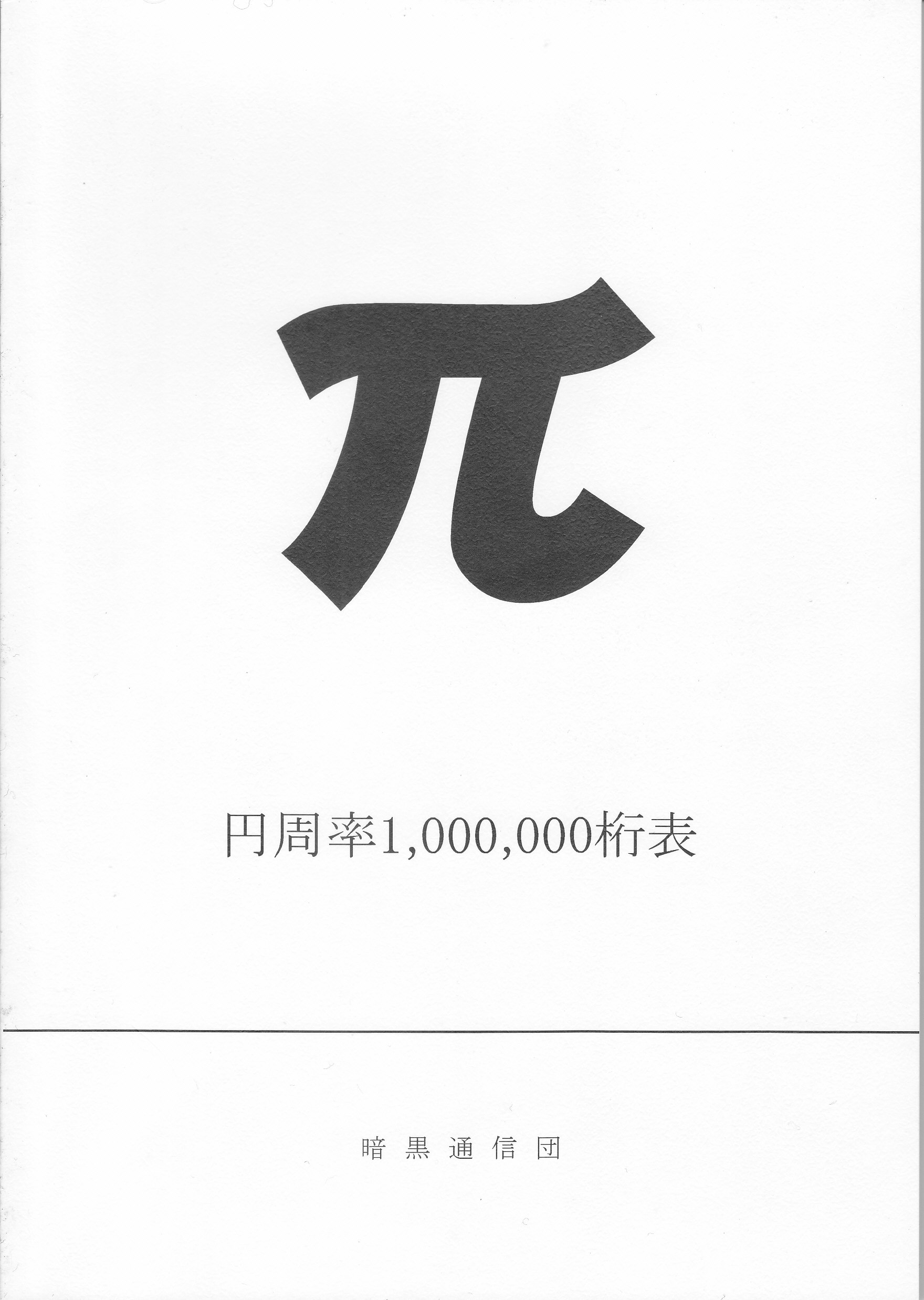 円周率1000000桁表の表紙。原著作者はこの本に関するありとあらゆる著作権を放棄している。この表紙もパブリックドメイン。